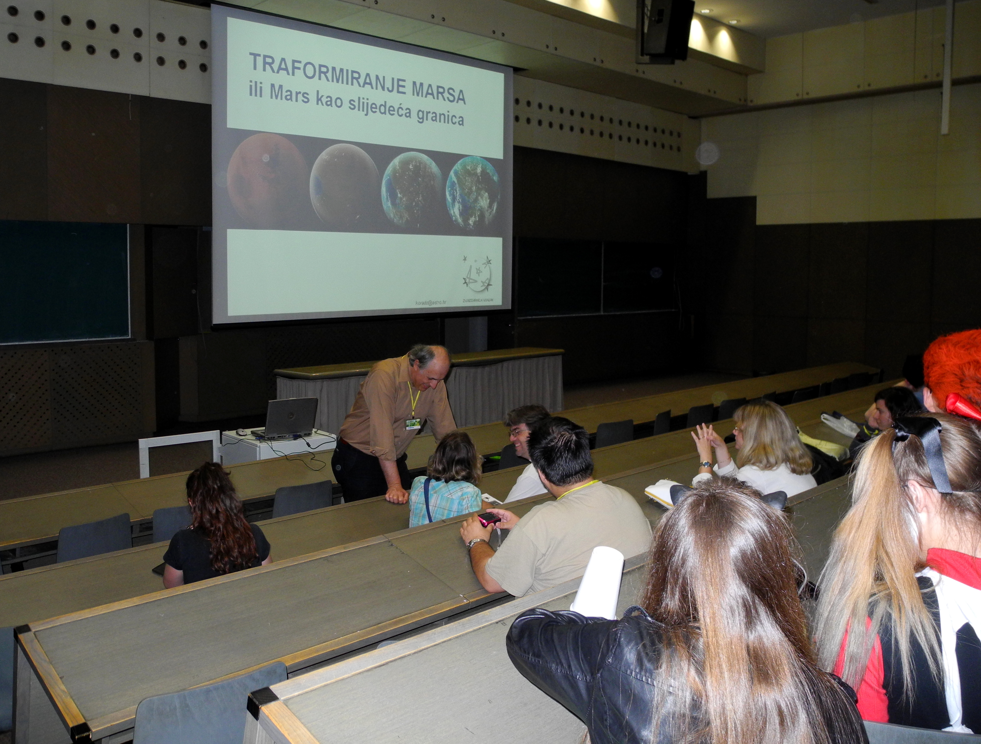 35. SFeraKon u Zagrebu; Korado Korlević, Teraformiranje Marsa